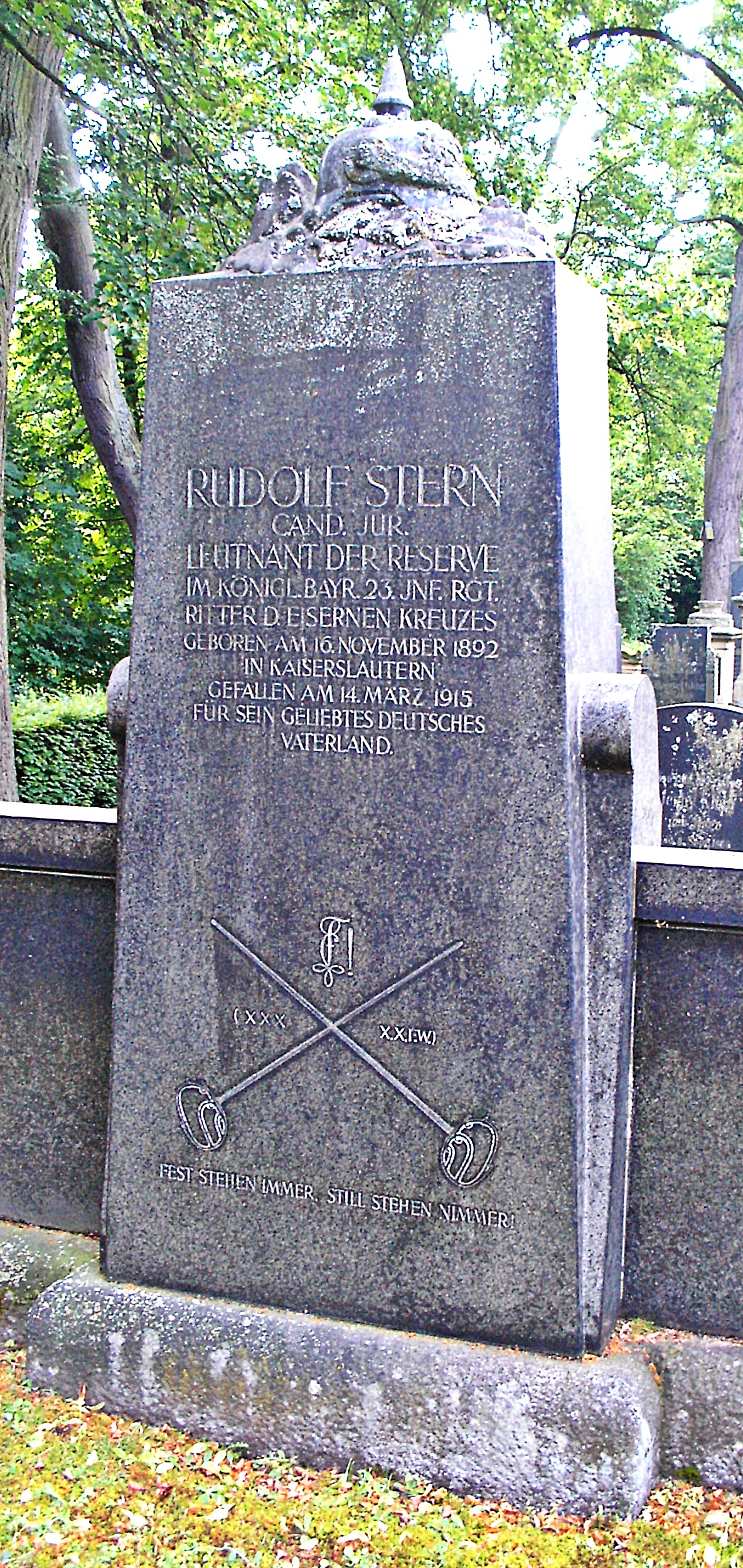 Grabstein eines Gefallenen Juden und Offiziers im 23. Bay. Inf. Rgt., Jüdischer Friedhof Kaiserslautern.